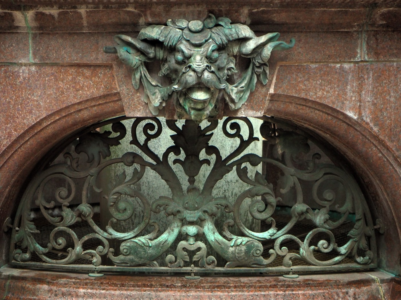 Hamburg, Hygieiabrunnen Lufteinlass, Foto 2015